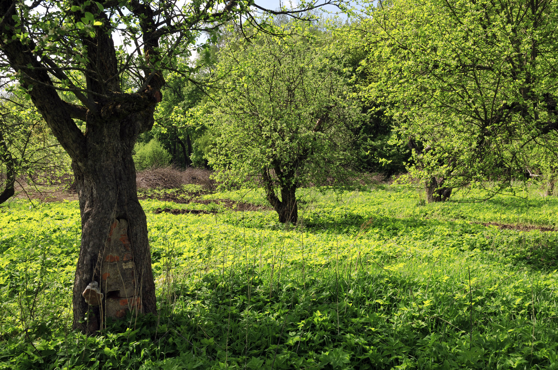 Piante di melo centenarie nel meleto di Tolstoj a Jasnaja Poljana